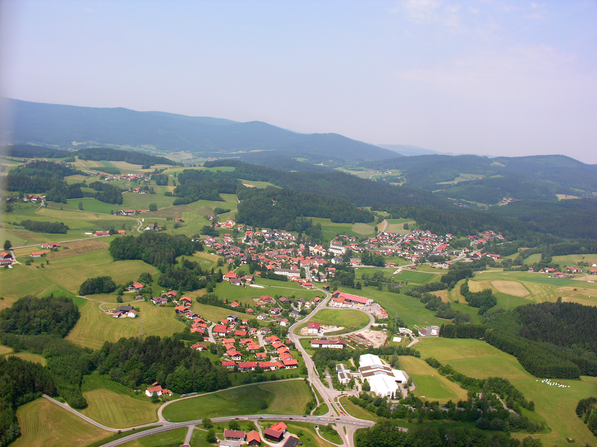 Germany, Bavaria, Gotteszell